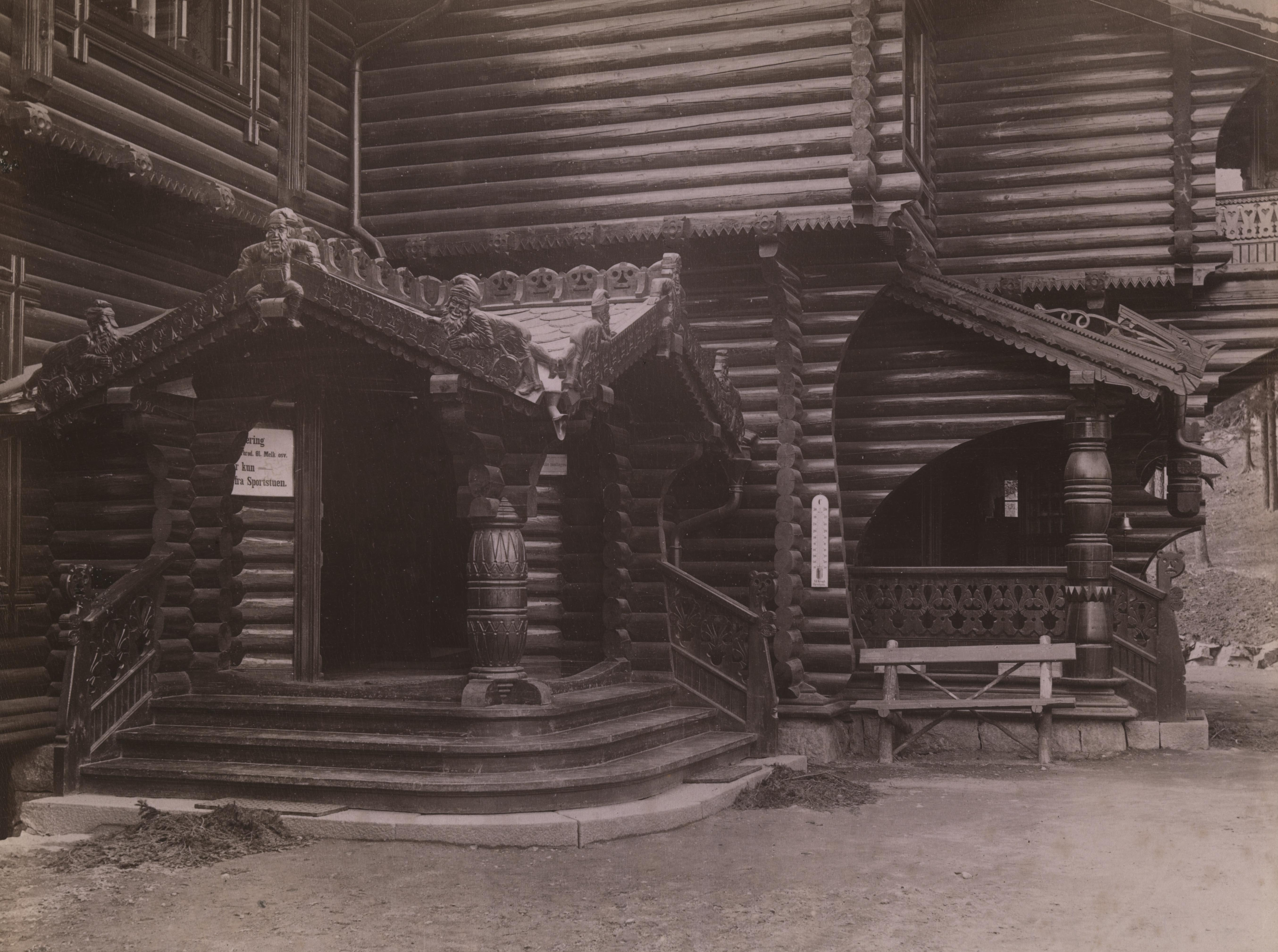 Bildet er hentet fra Nasjonalbibliotekets bildesamling Holmenkollen, Oslo, Oslo